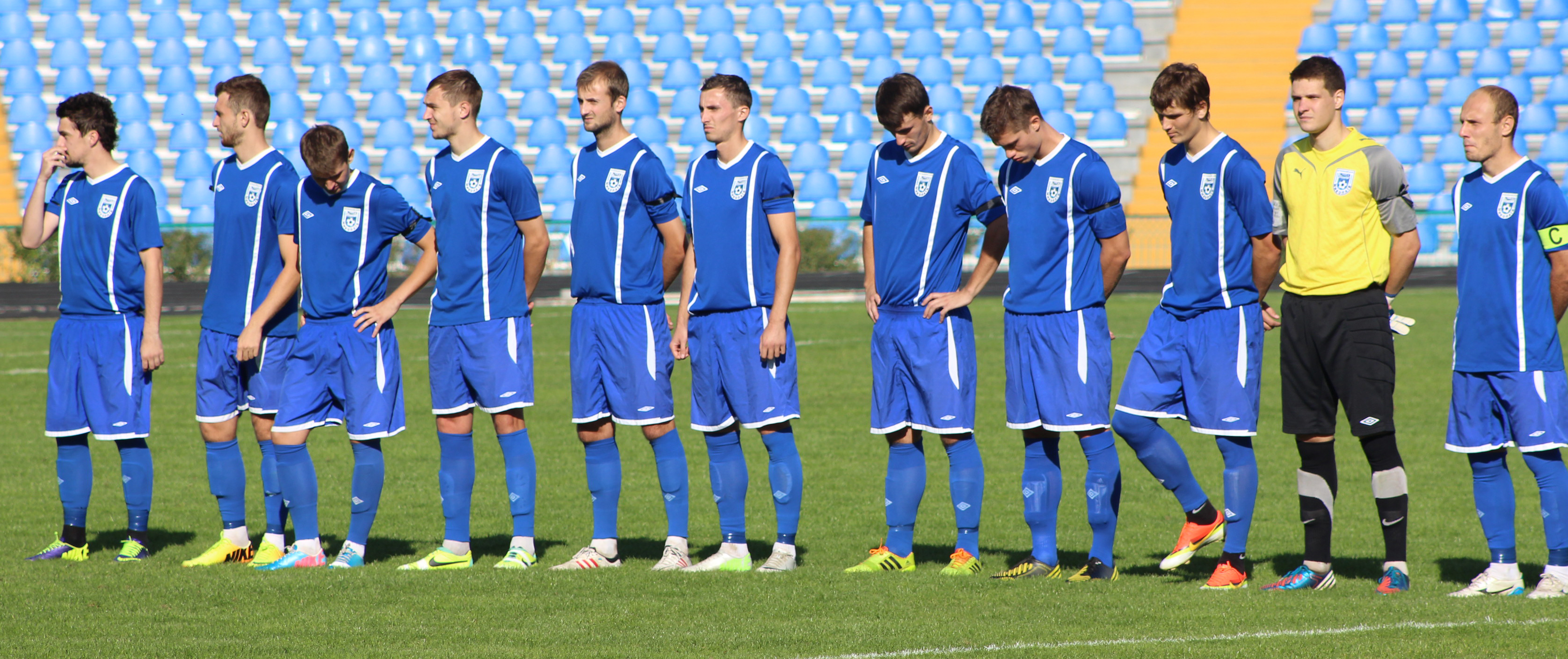 MFC Mykolaiv in 2014 (Autumn)